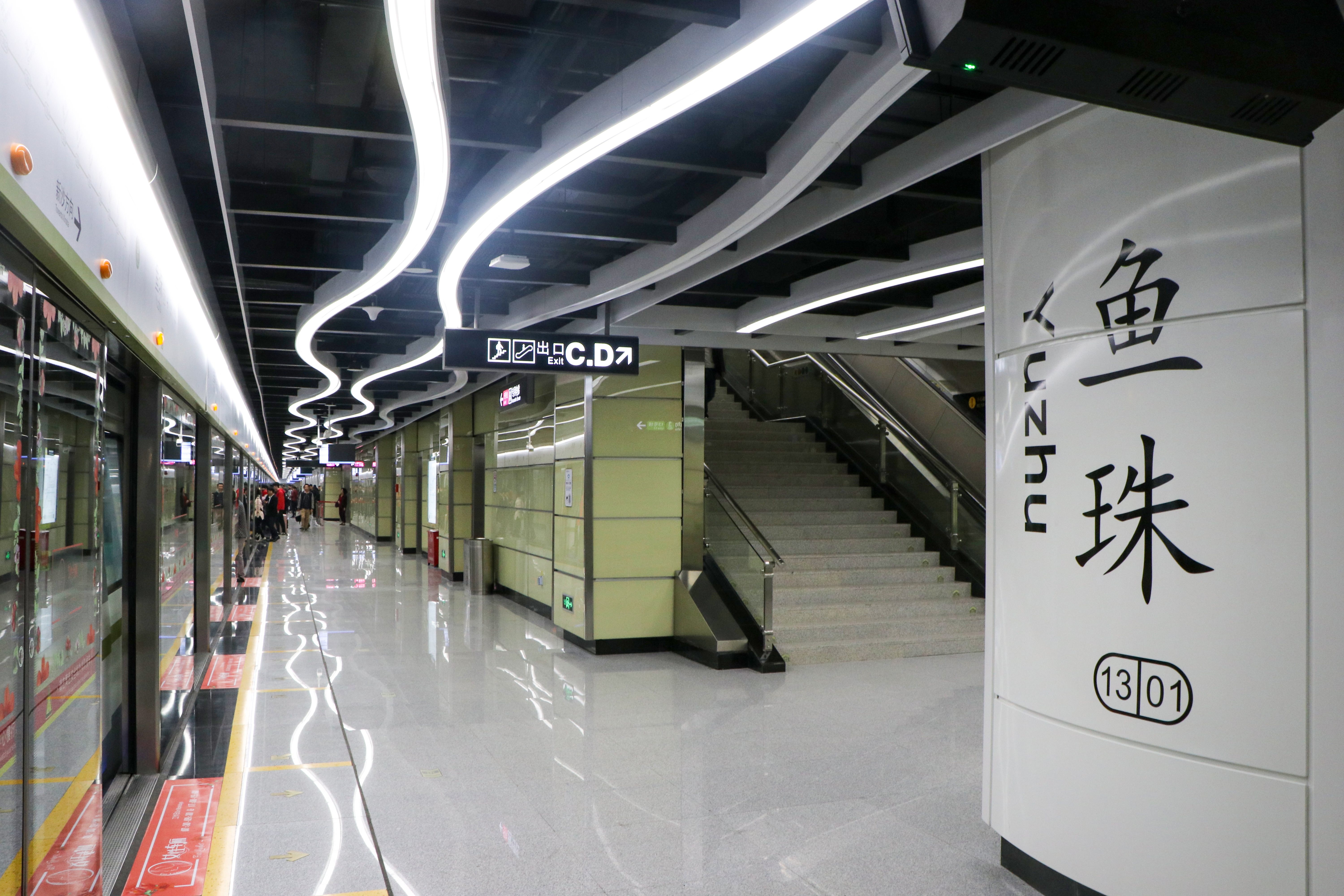 广州地铁鱼珠站